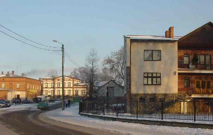 Stara Kiszewa (zima 2003) - Stako